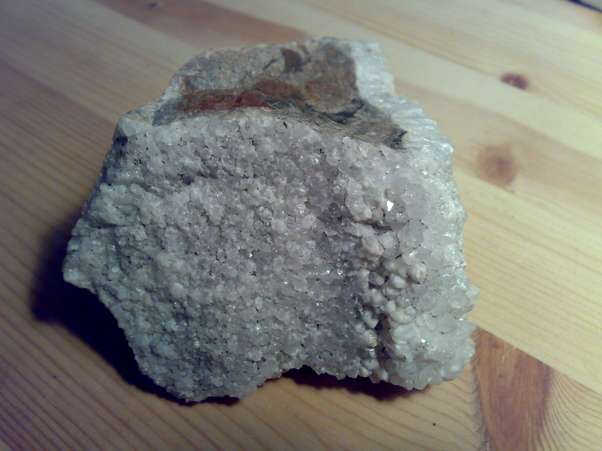 Bergkrystall kvarts crystalline quartz quartzite